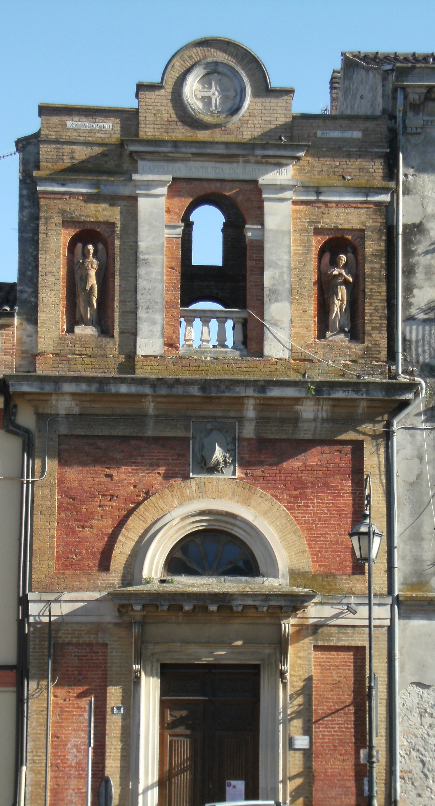 Cappella gentilizia di San Gaetano Thiene (De Bartolomei) di Giulianova